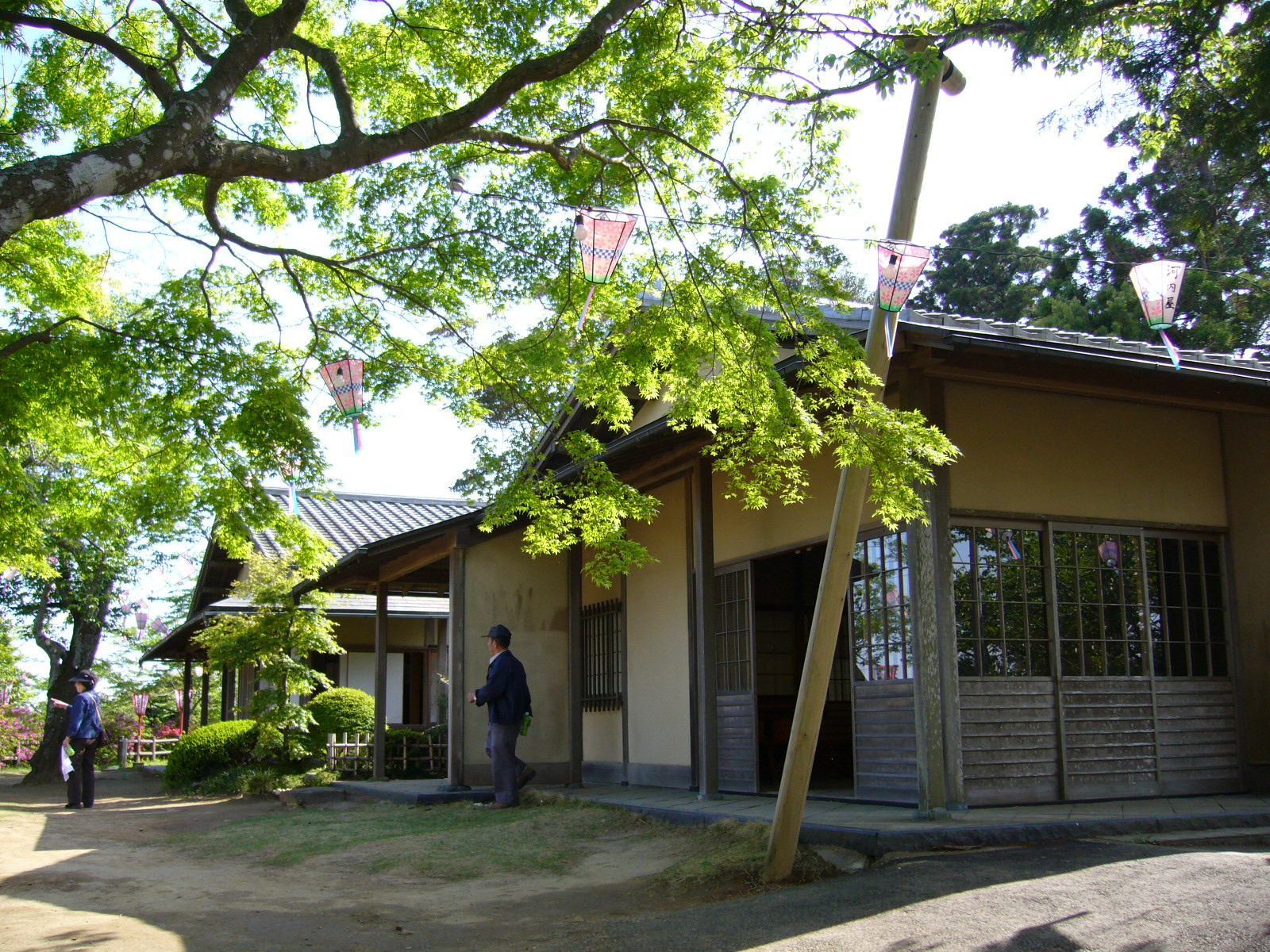 joyama park seihuuso,katori-city,japan